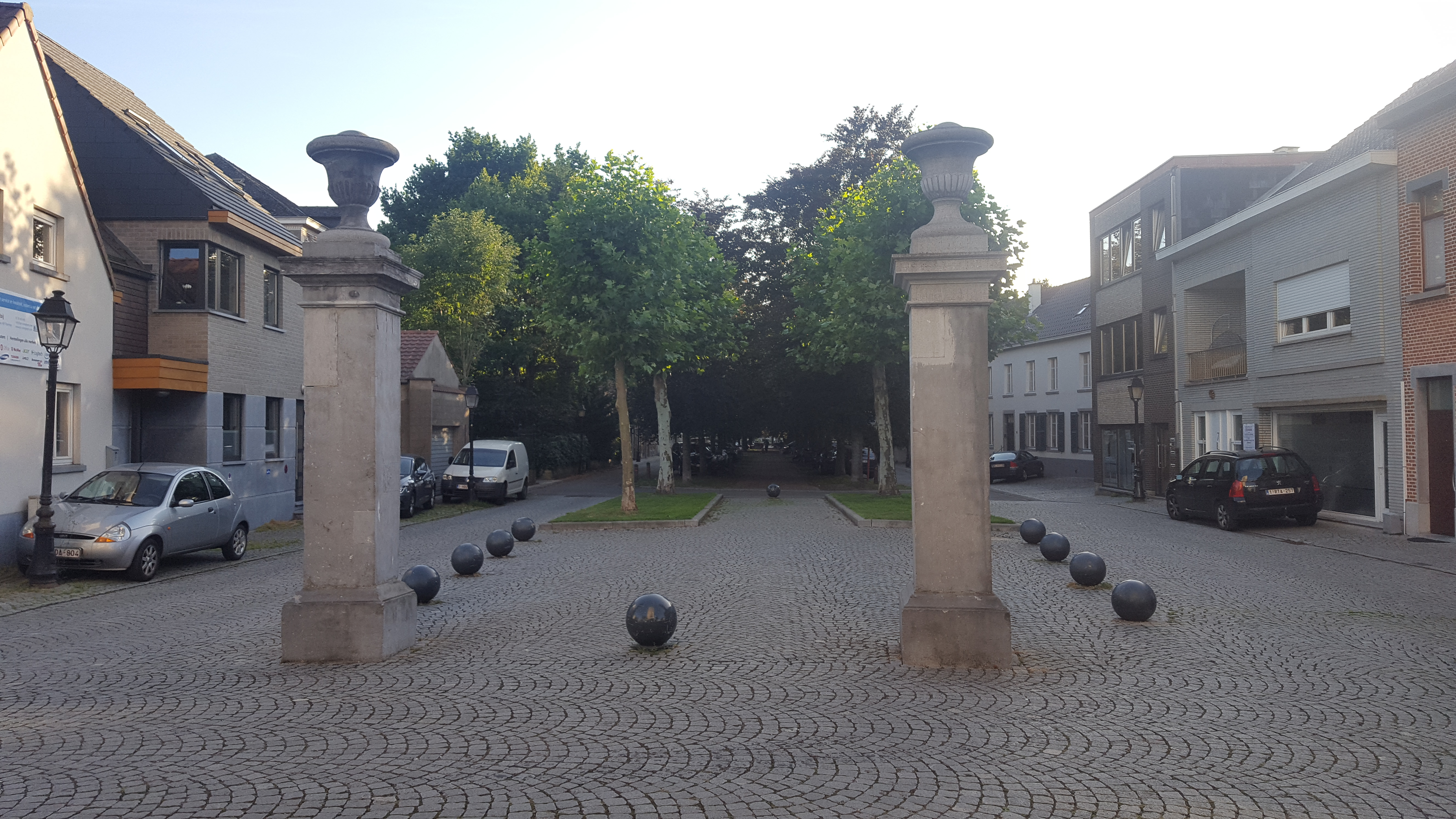 Dreef (straat), Ternat, België